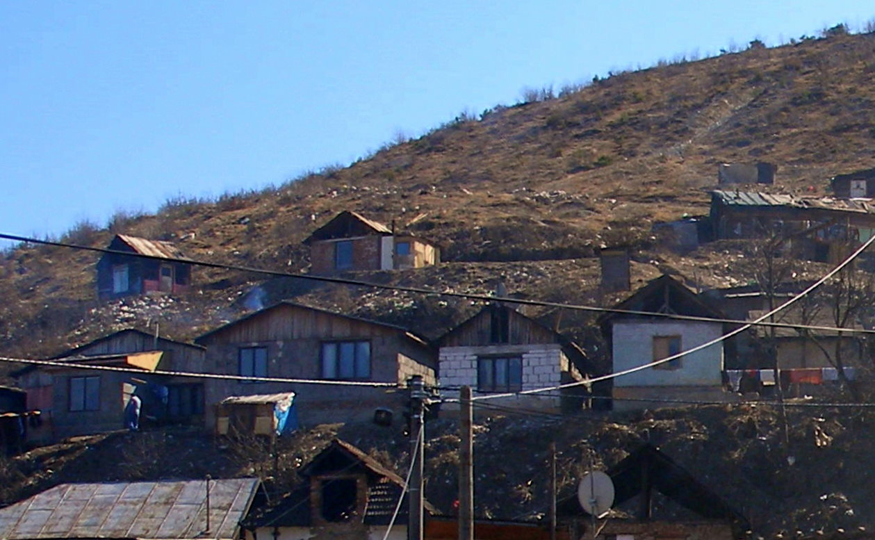 Rómska osada pri obci Richnava okres Gelnica.